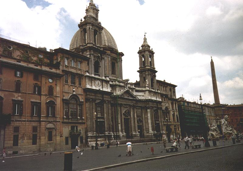 Sant' Agnese in Agone, Roma